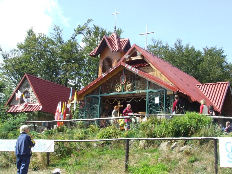 Kaplica na Groniu Jana Pawła II w czasie Mszy Św., Autor: Ukasiu